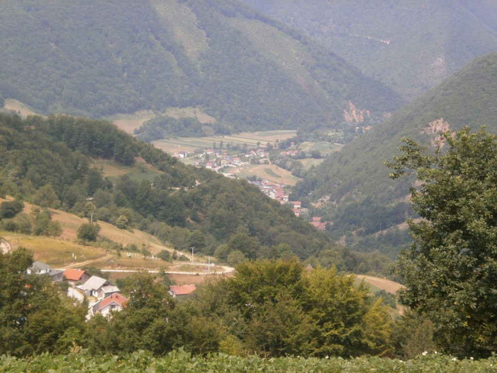 Voljevac